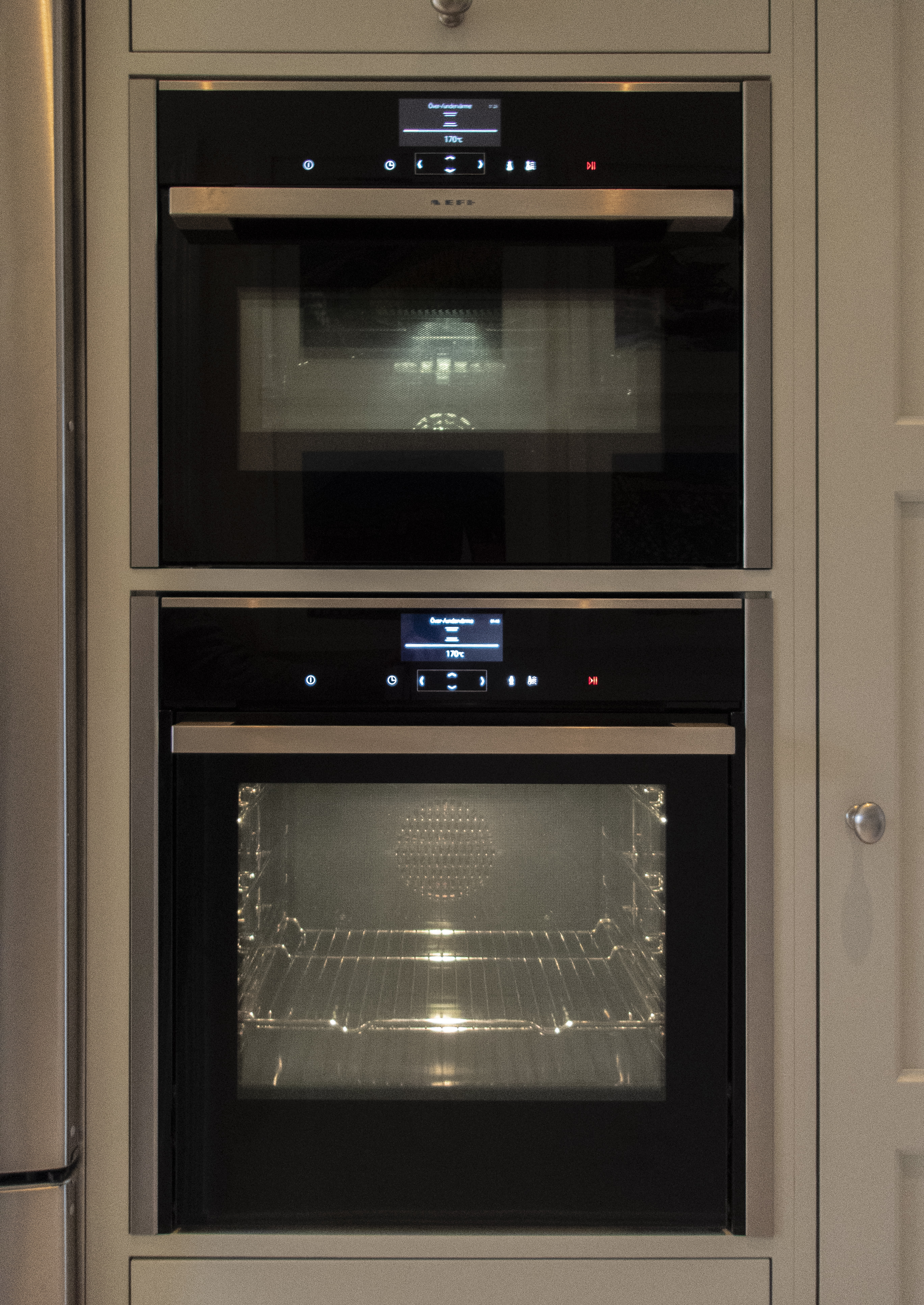 Neff micro and owens. (C17MS22N0 & B57CS28N0)